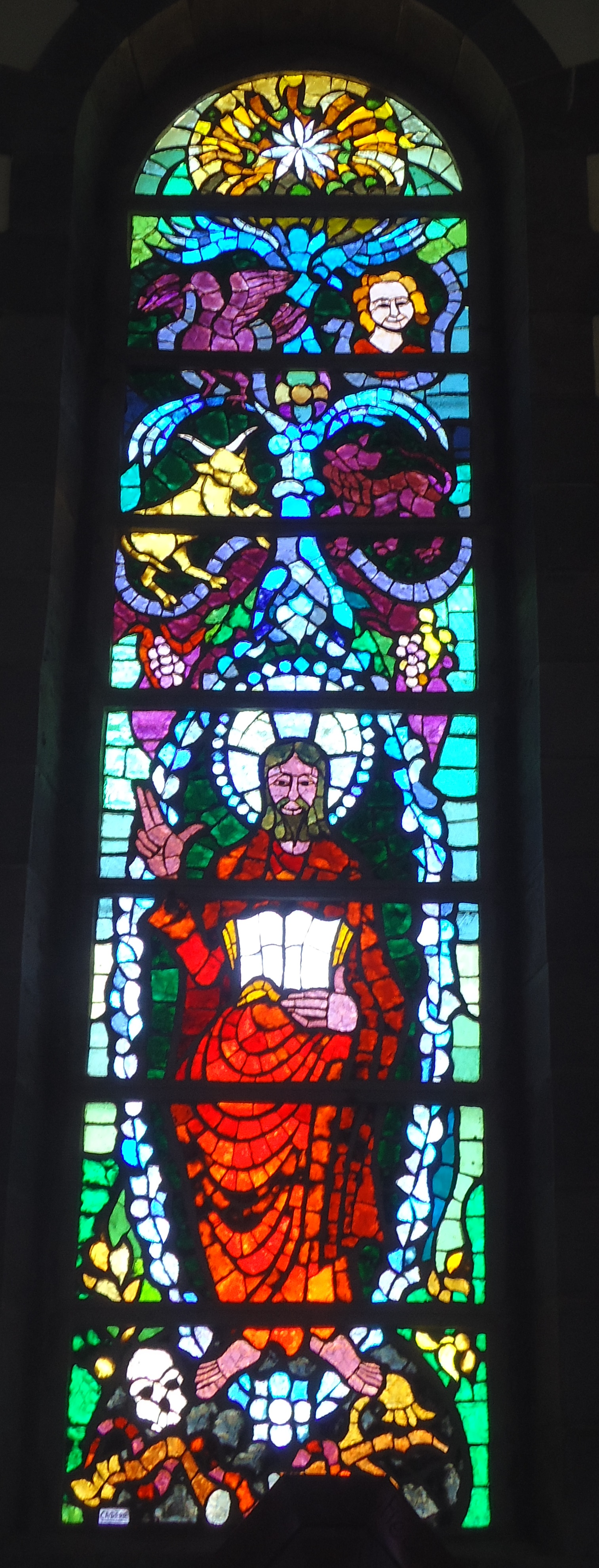 Vitrail Eglise Saint-André